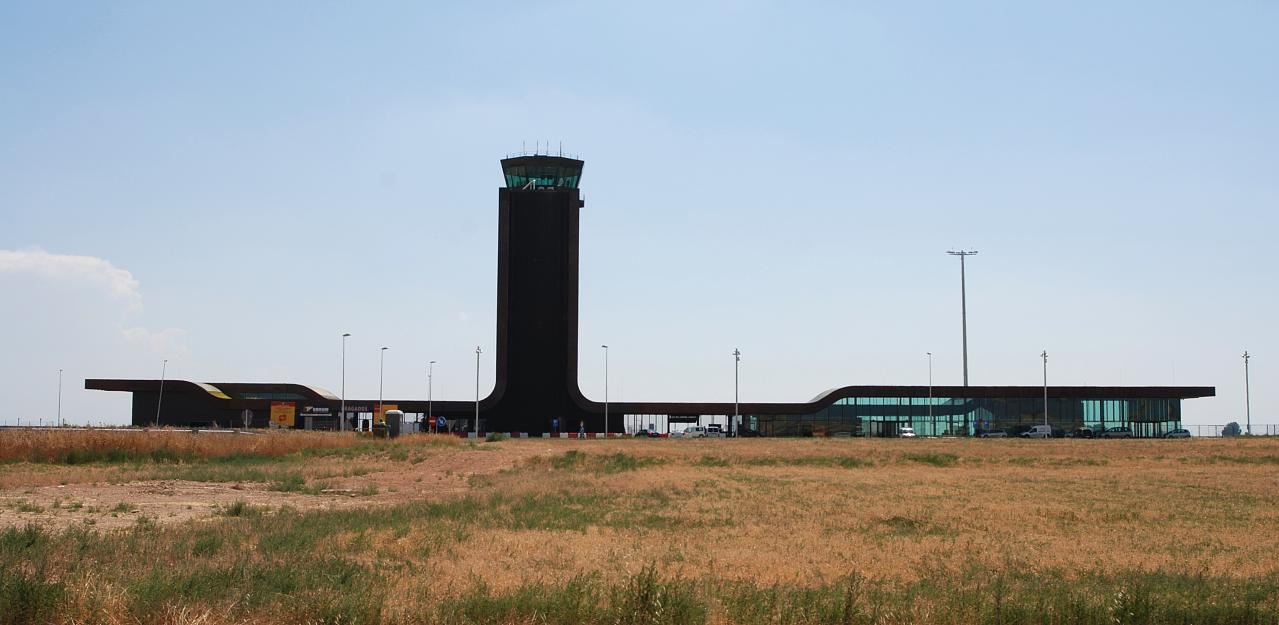 Terminal i torre de l'Aeroport de Lleida-Alguaire (perfil)